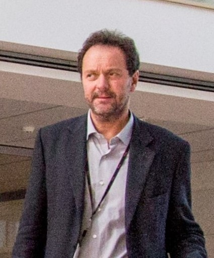 Direttore del Museo tridentino di scienze naturali sino al 2013 e poi del MUSE (L'immagine è un particolare di quella indicata come fonte)